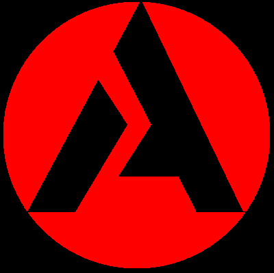 Atlantas logo (Atlanta er en dansk højtalerproducent).